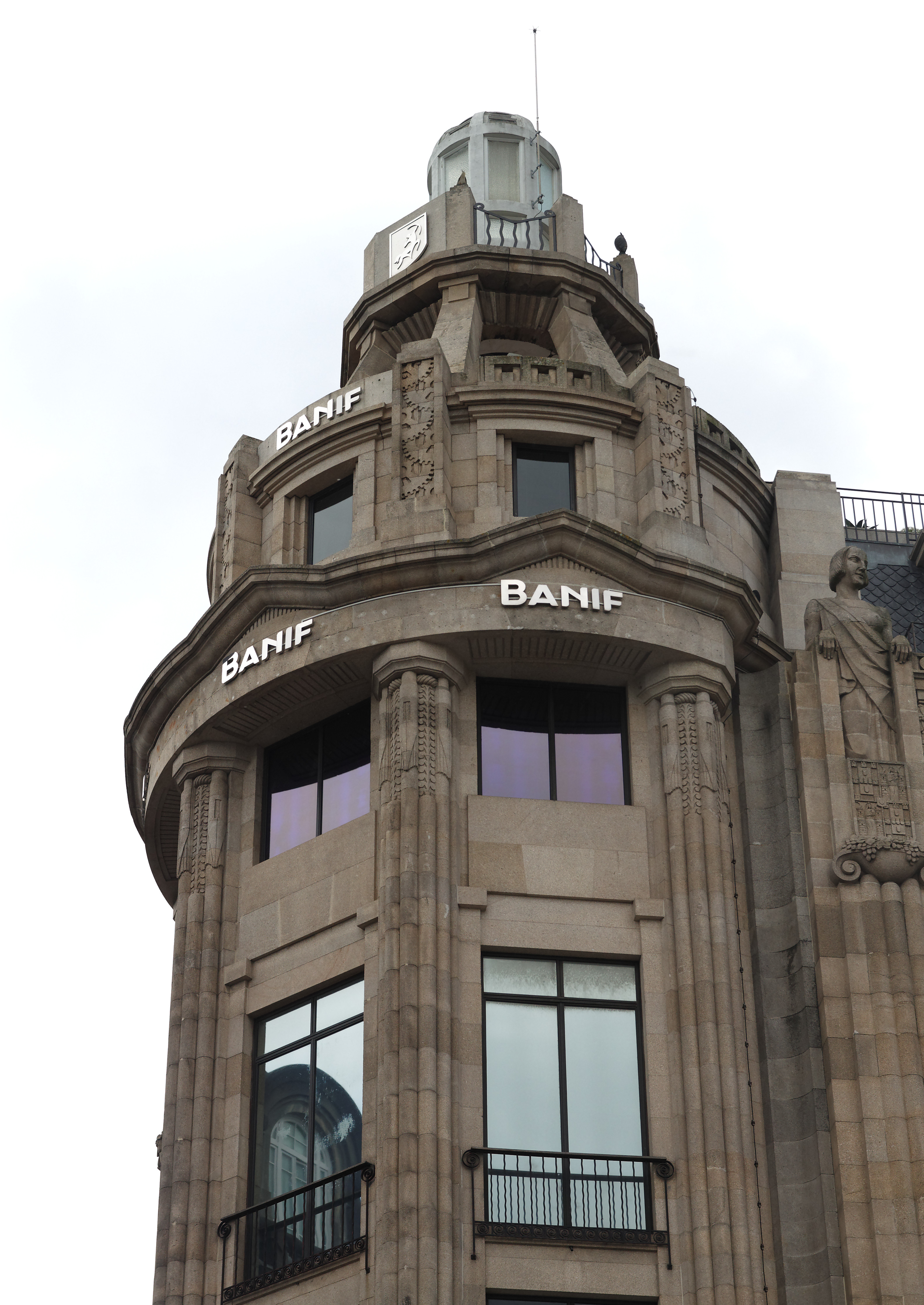 Cúpula del banco Banif ubicado en Avenida de los Aliados, Oporto, Portugal.